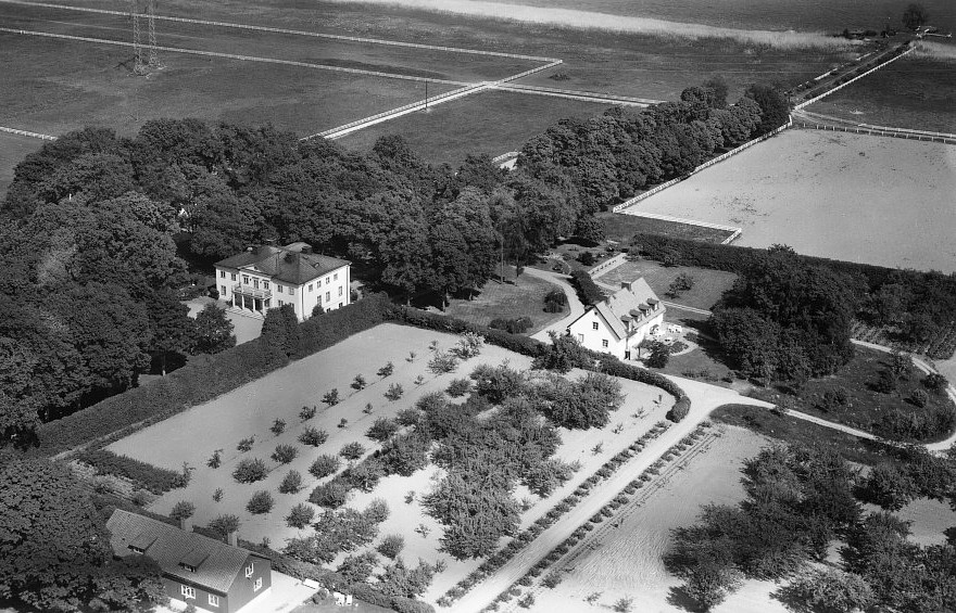 Flygfoto över Menhammar, Ekerö kommun.